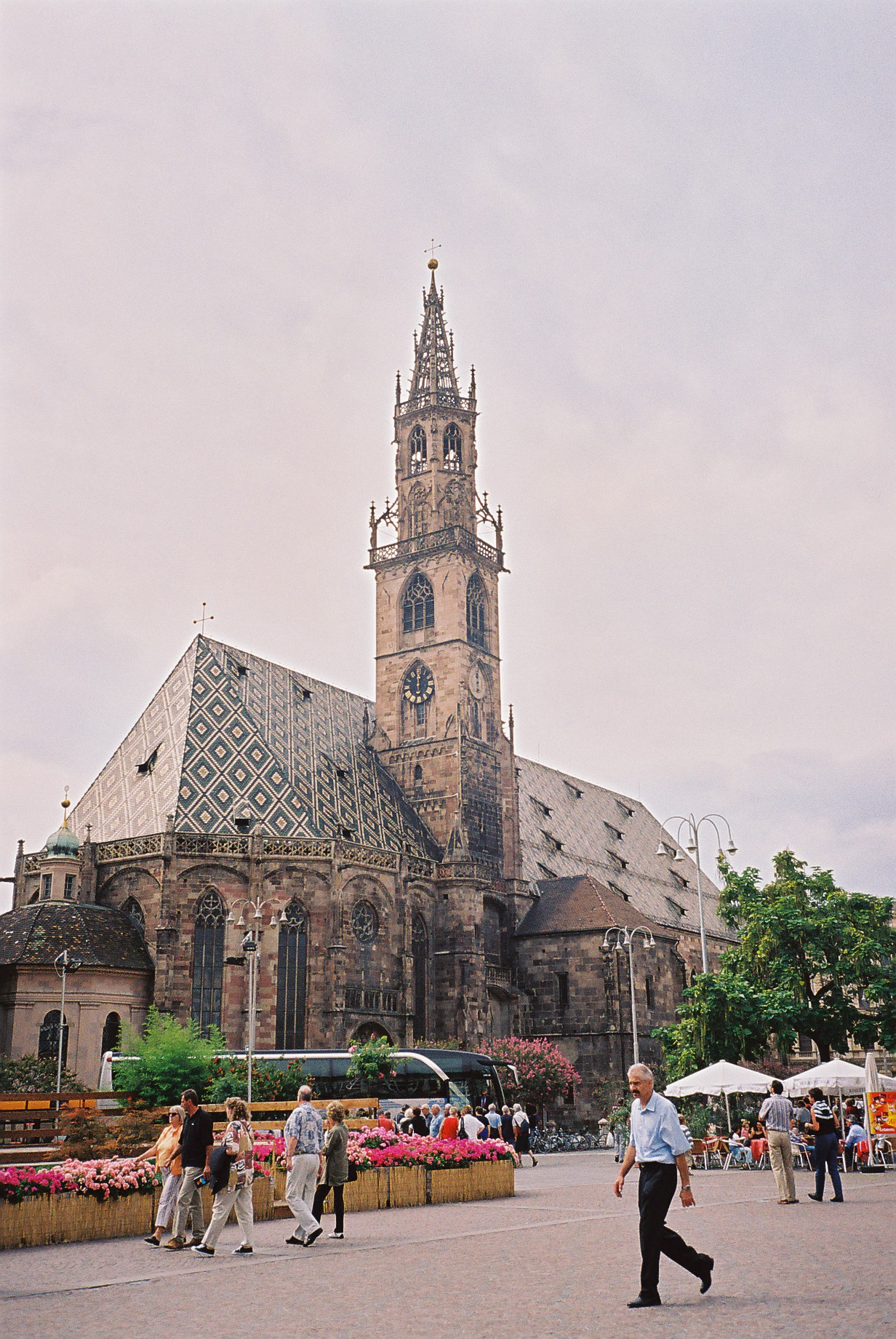 Dom van Bolzano-Stad in 2004. Eigen werk, vrij voor het publiek.